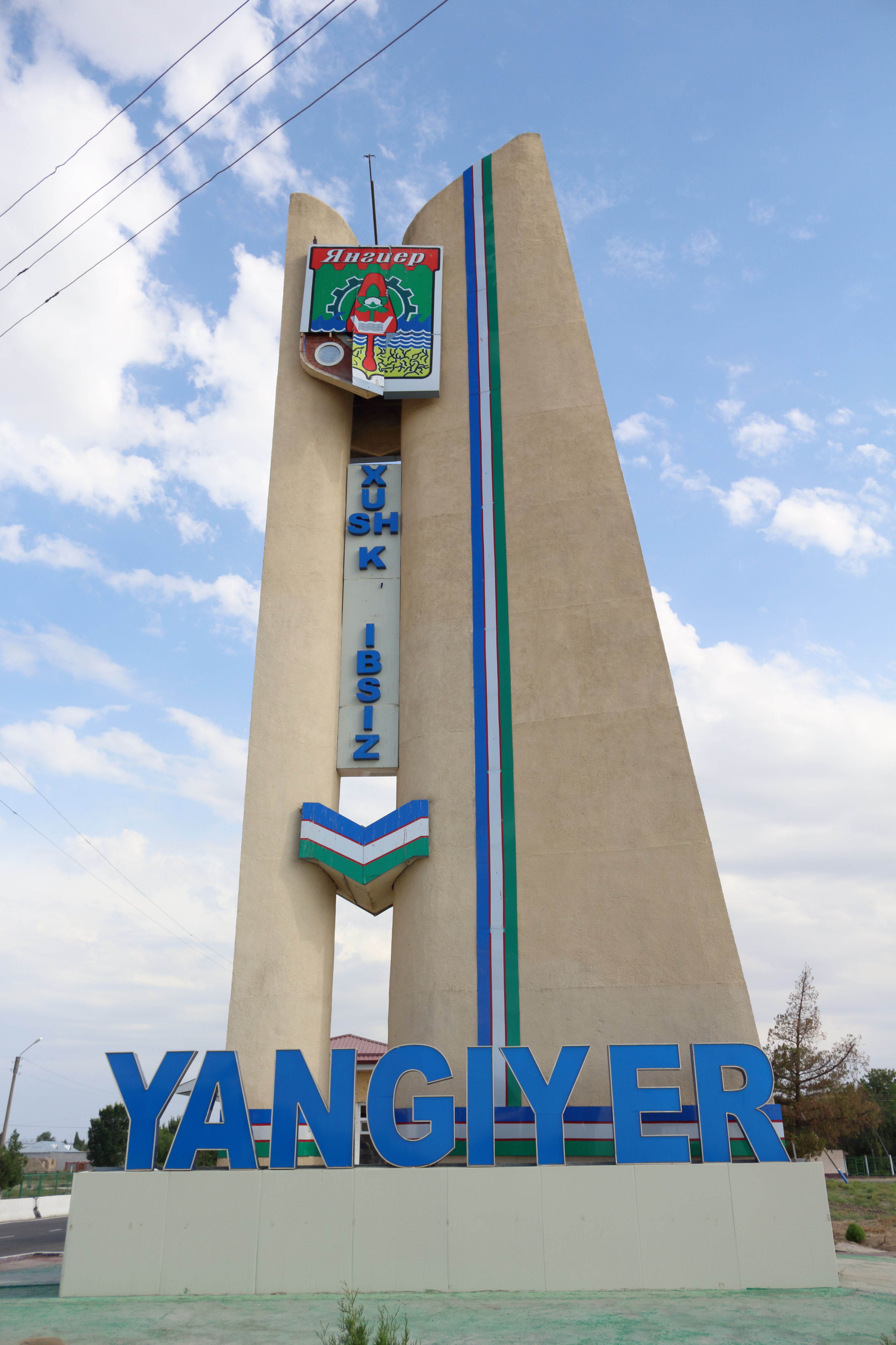 Обозначение границы города Янгиер Сырдарьинской области Узбекистана.